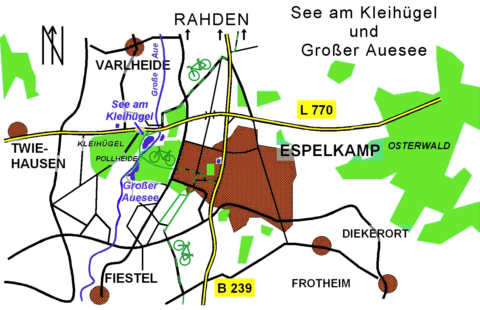 Lage des Großen Auesees Korrekturen und Ergänzungen Ulamm 15:09, 5. Mai 2008 (CEST) Sonstiges: Zur freien Verwendung